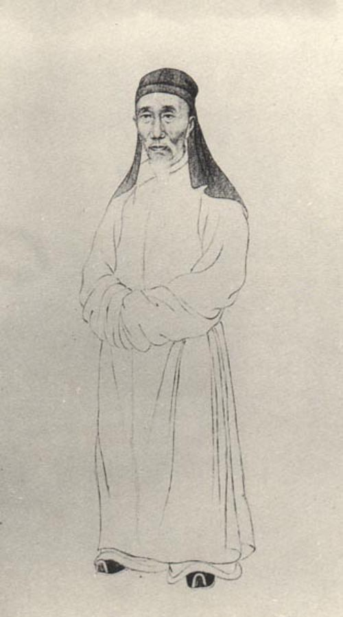 鄭珍，清代學者。Zheng Zhen